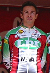 Pavel Tonkov. Team L.P.R.